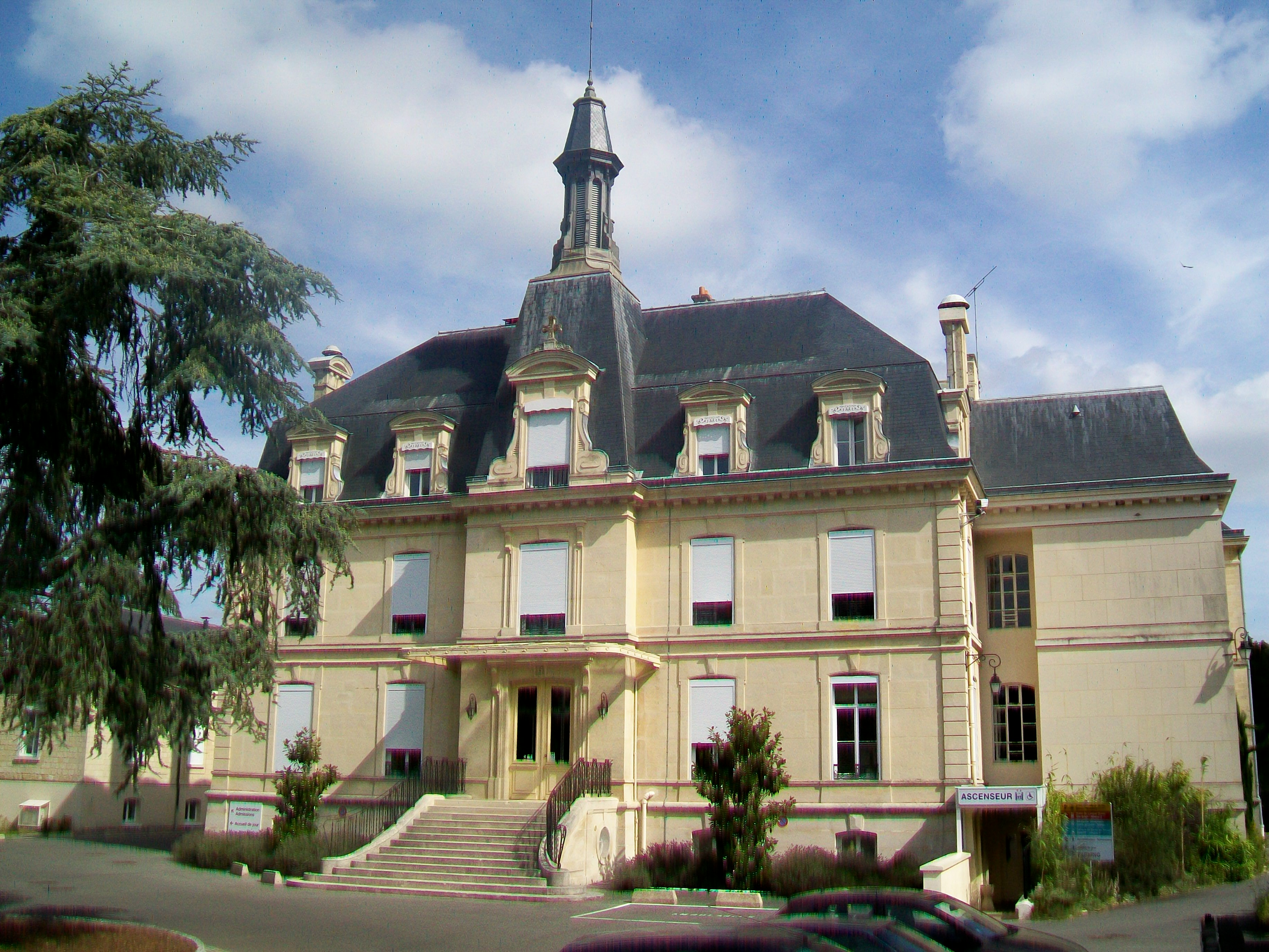 L'hôpital de la fondation Chantepie-Mancier.